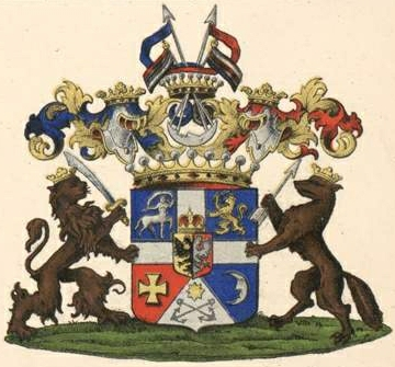 Golovini suguvõsa krahvivapp